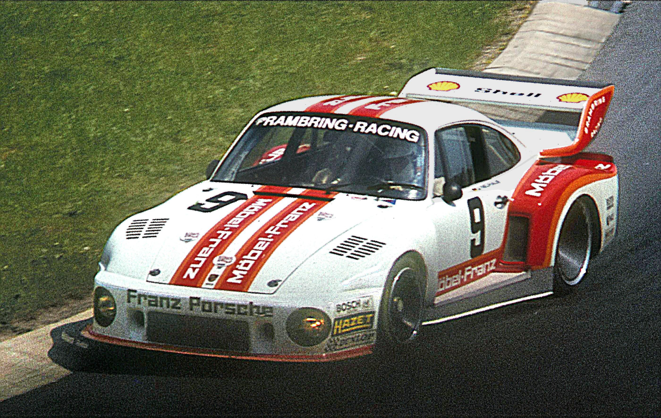 Porsche 935 mit Leo Kinnunen beim 1000-km-Rennen auf dem Nürburgring. Zweiter Fahrer war Jürgen Neuhaus.